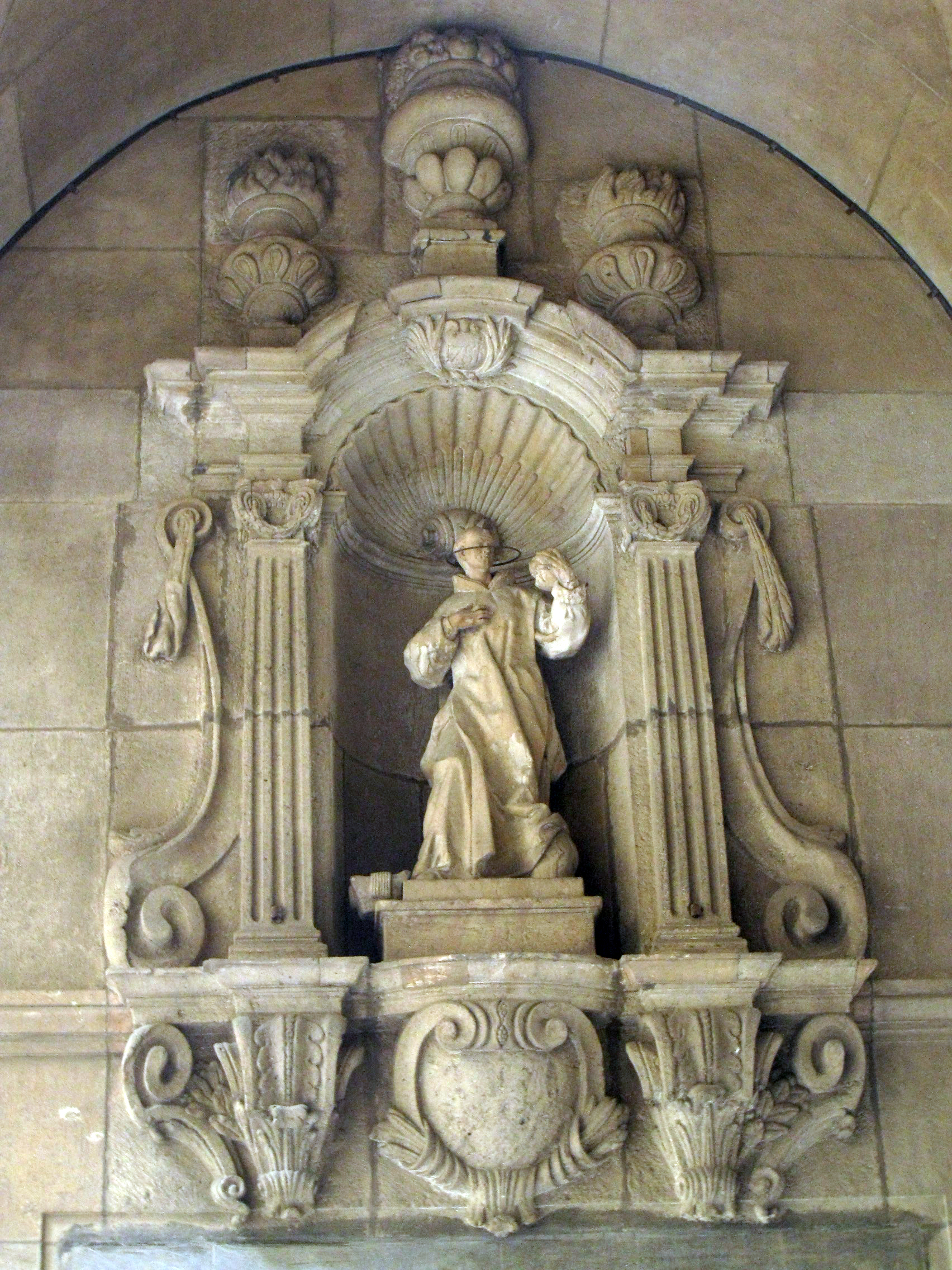 Casa de la Ciutat (Barcelona)